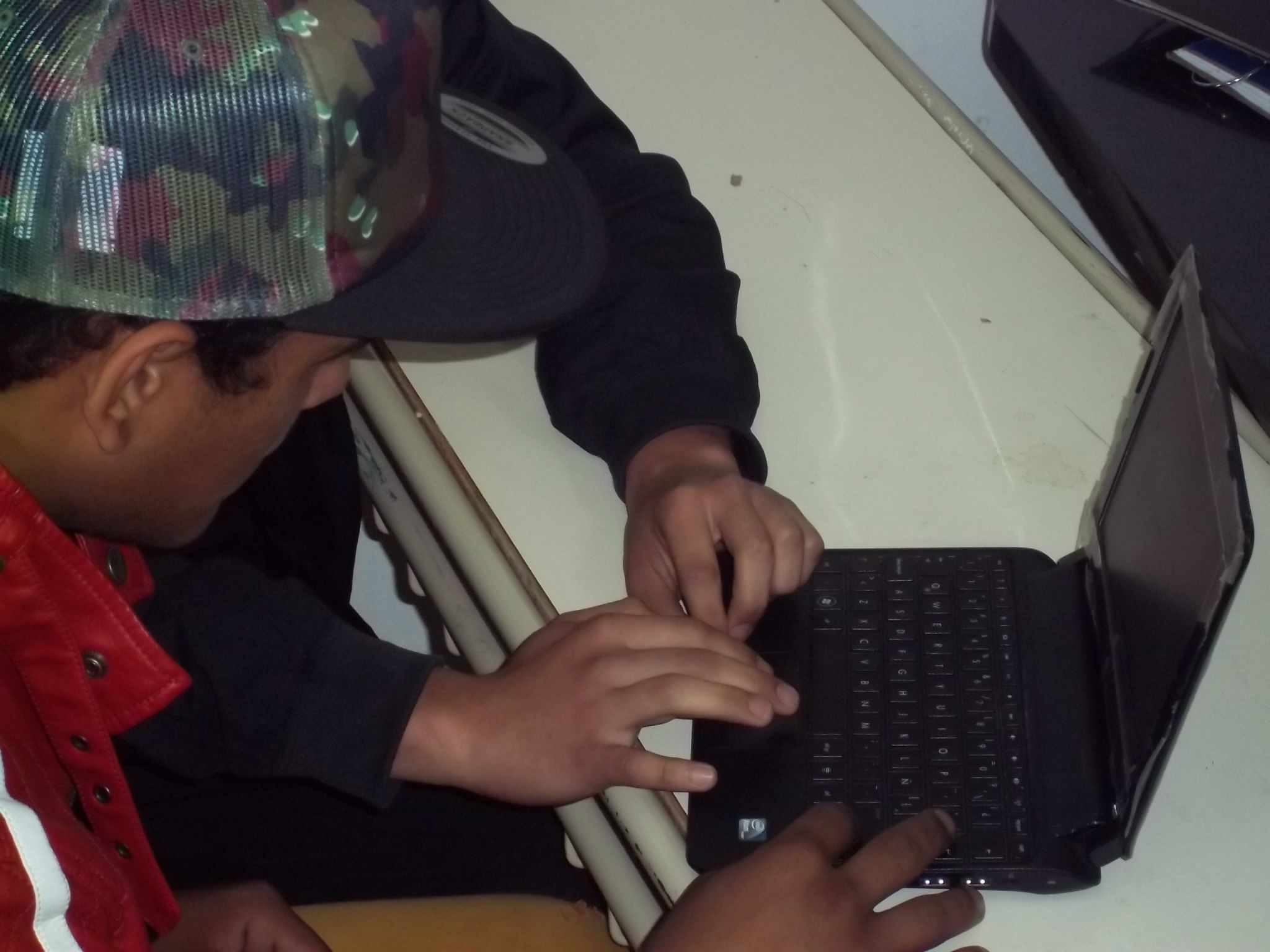 Con la net